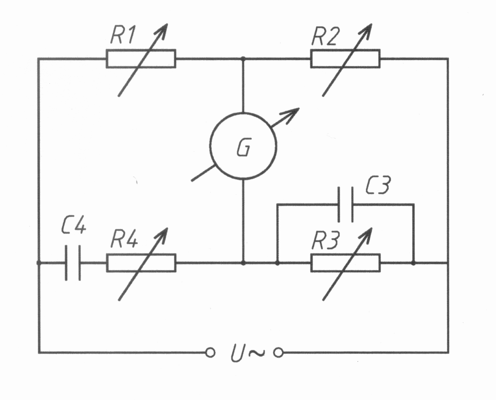 Wien-híd elvi kapcsolása